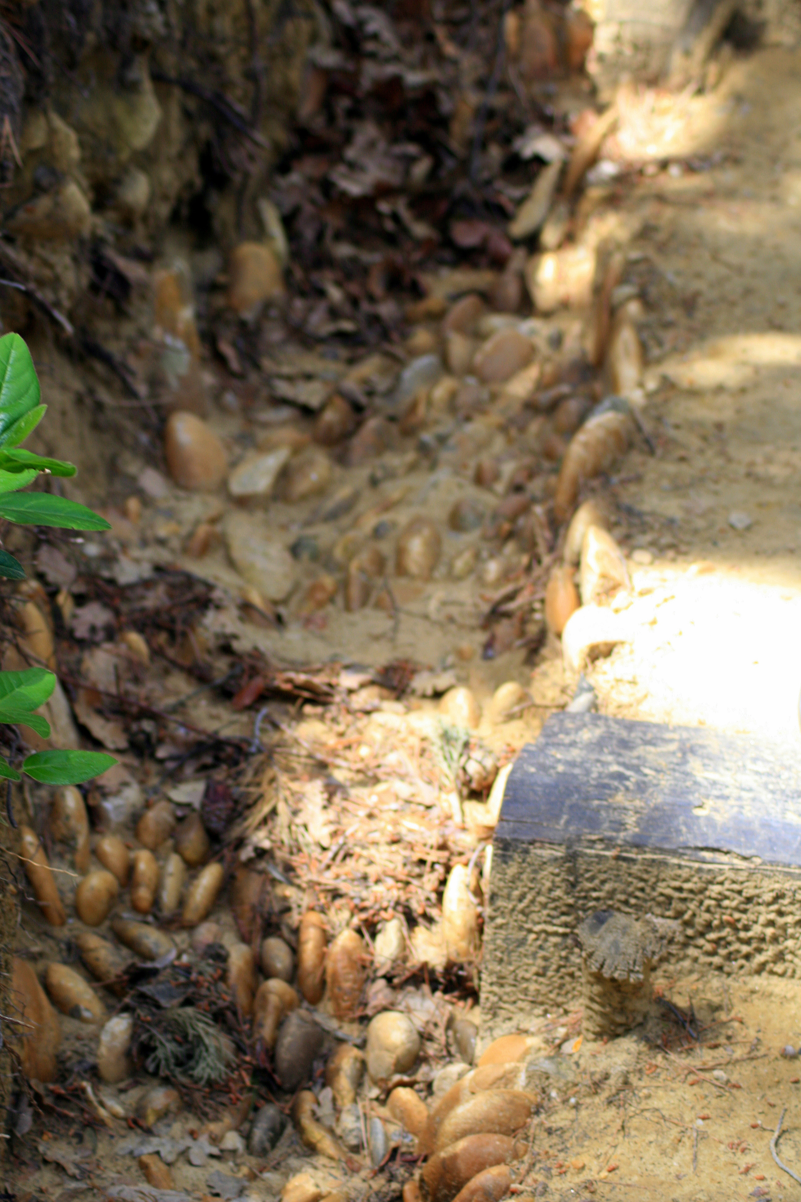 Fosse d'orage recouverte de petits galets